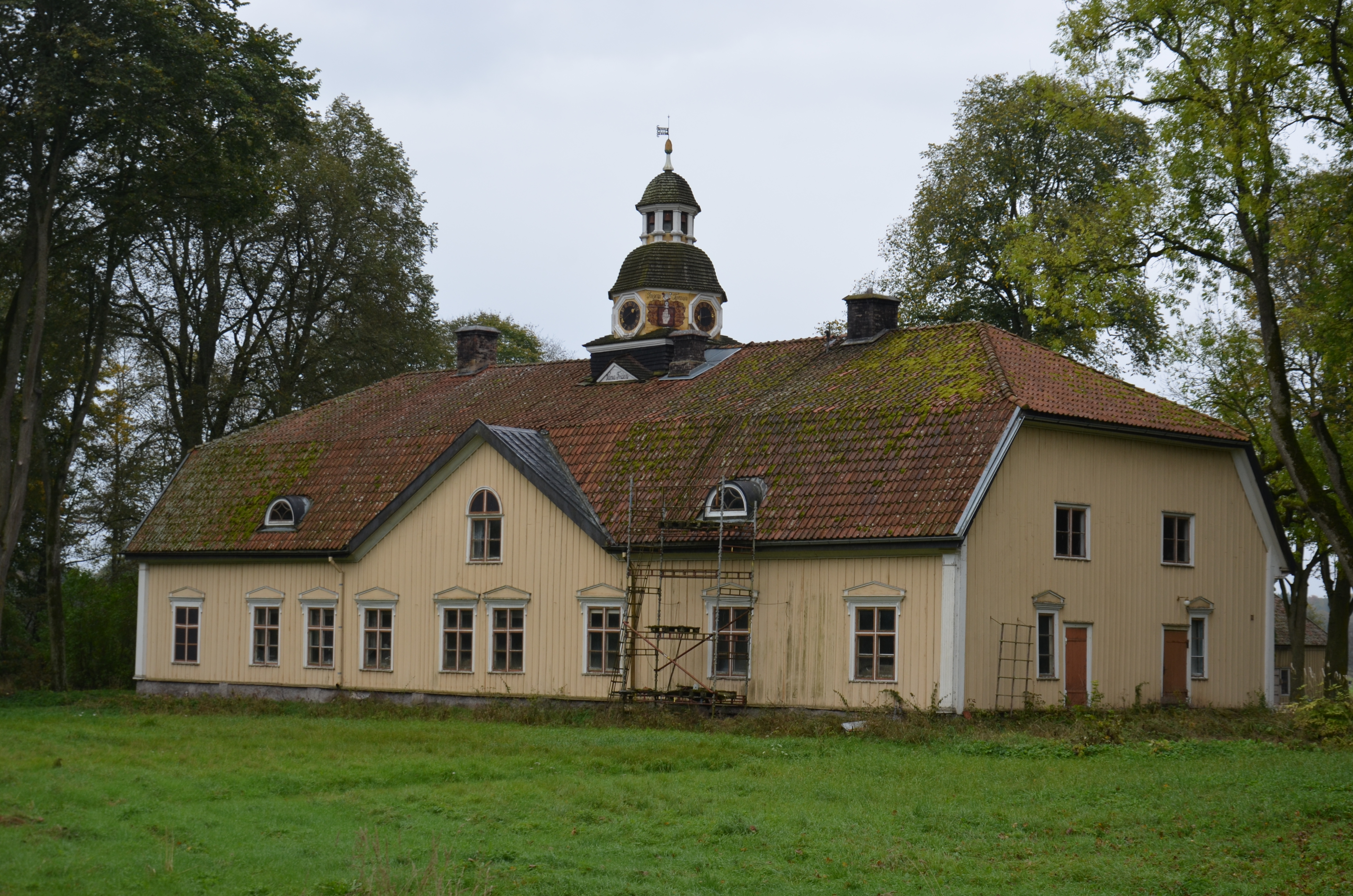 Göberga gård 01